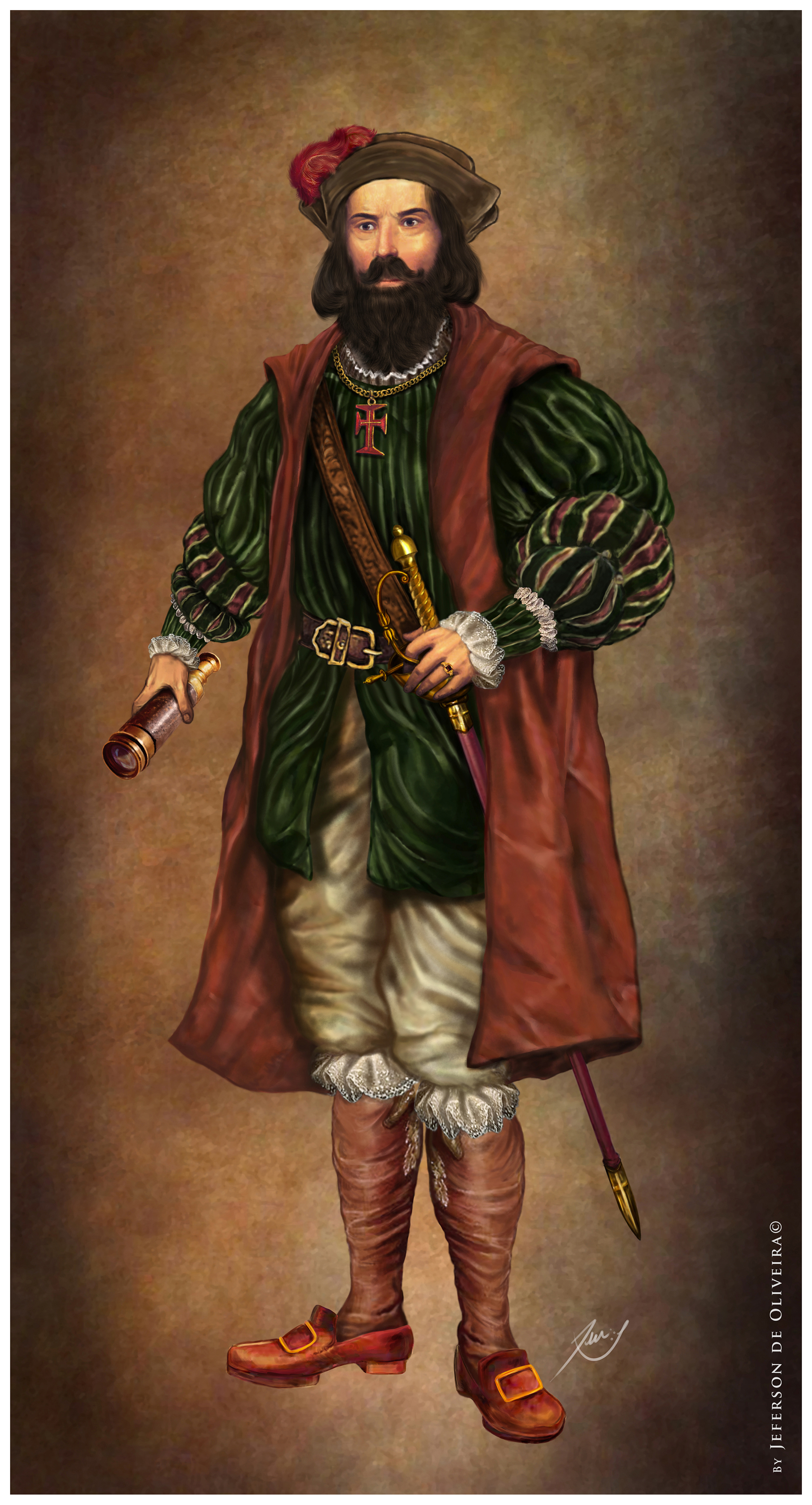 Ilustração Digital feita pelo Artista Capixaba, natural de Vila velha, Jeferson Castro de Oliveira.